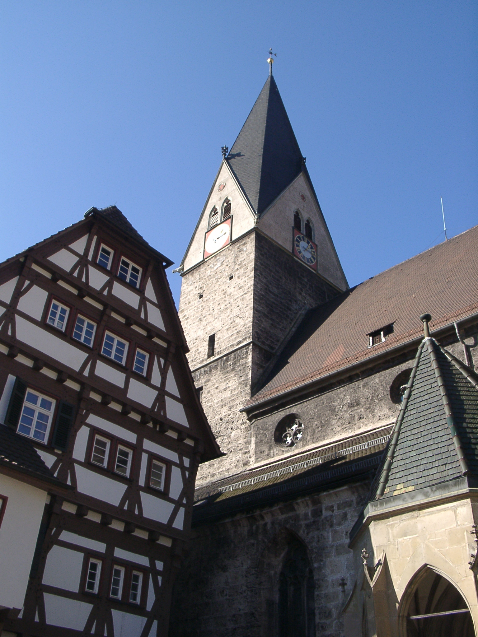 Stadtkirche Geislingen a d St